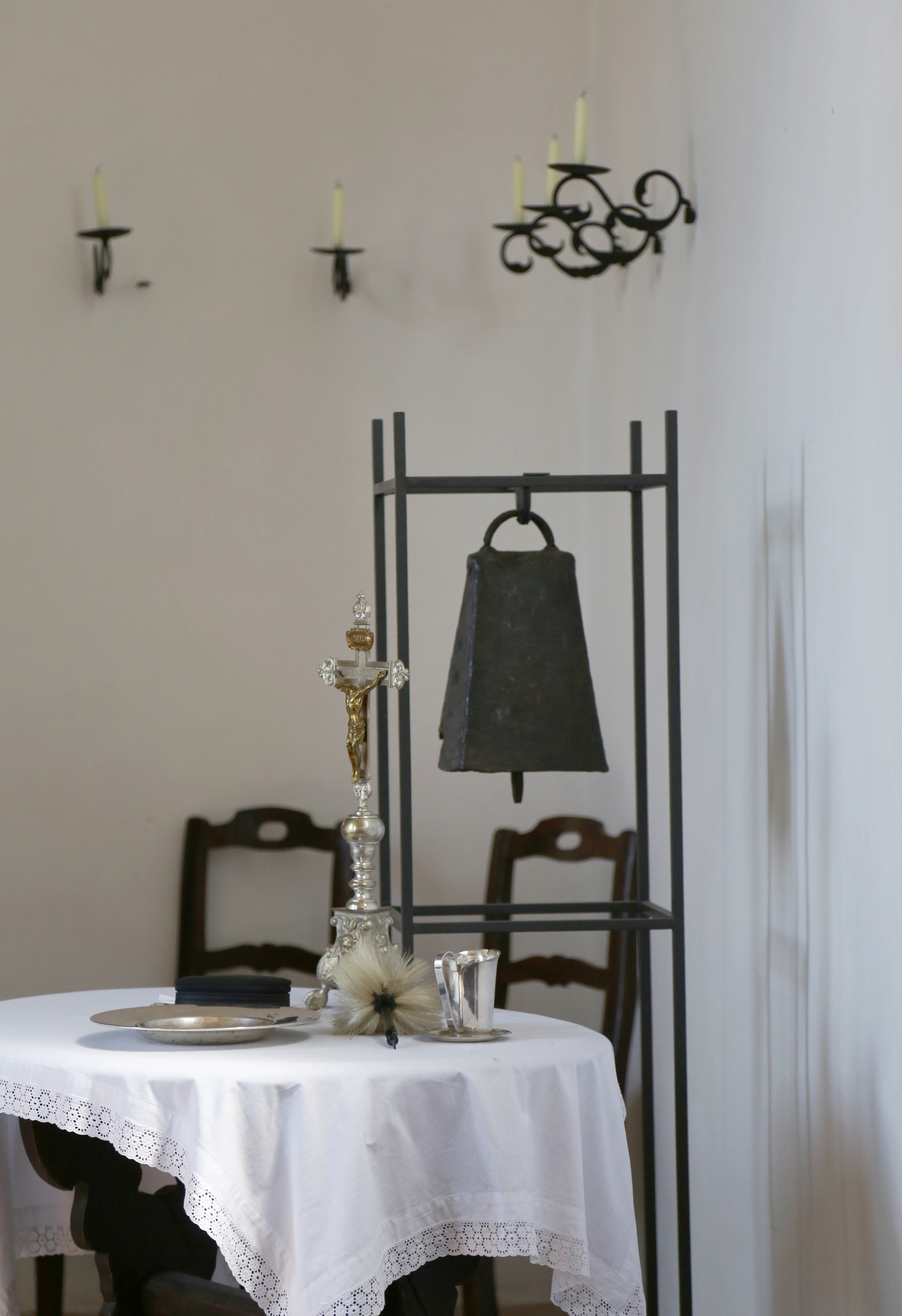 Kirche St. Georg bei Ramsach, Murnau am Staffelsee. Eiserne Glocke im Kircheninneren